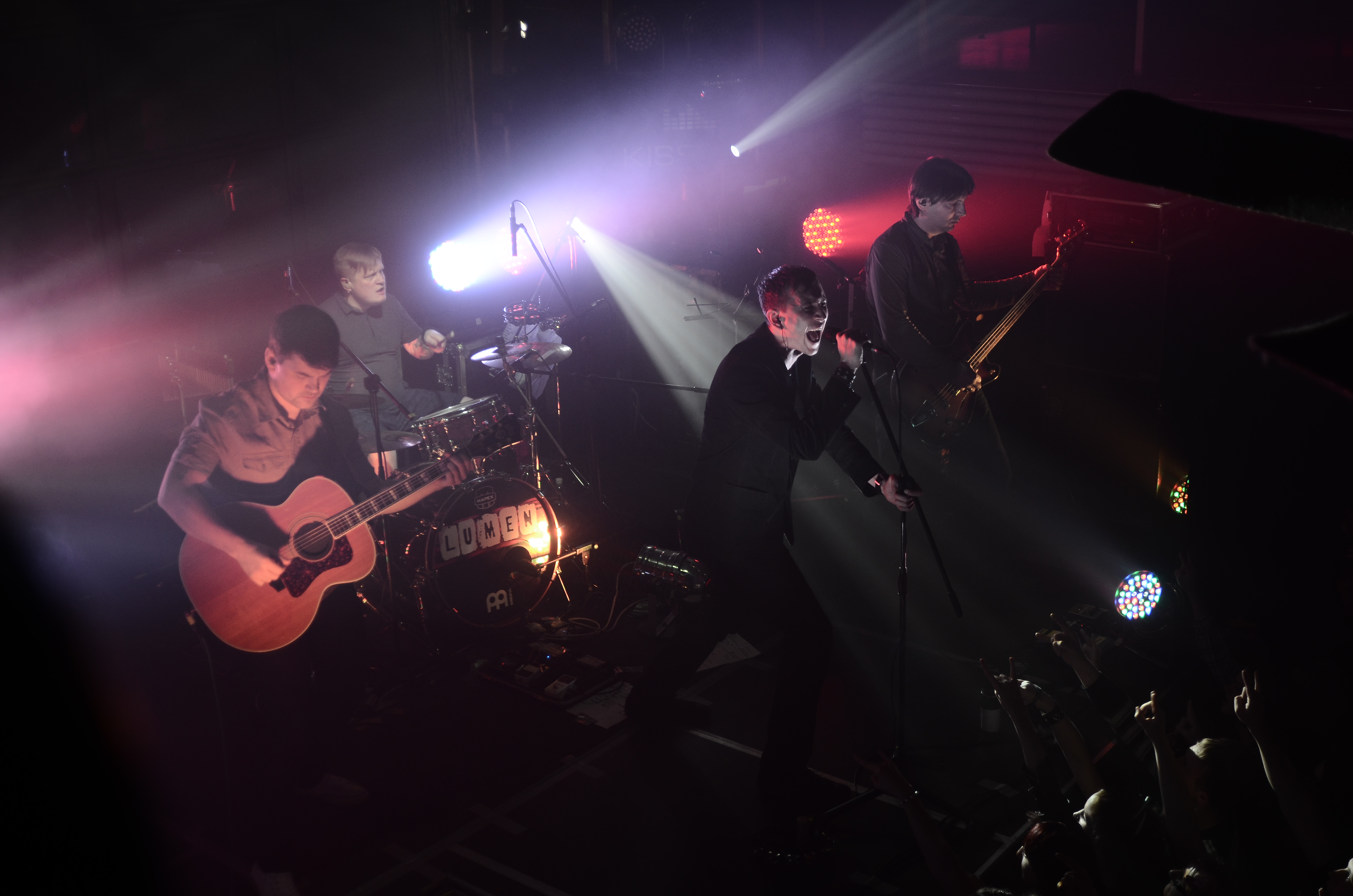 Концерт группы Lumen в Донецке